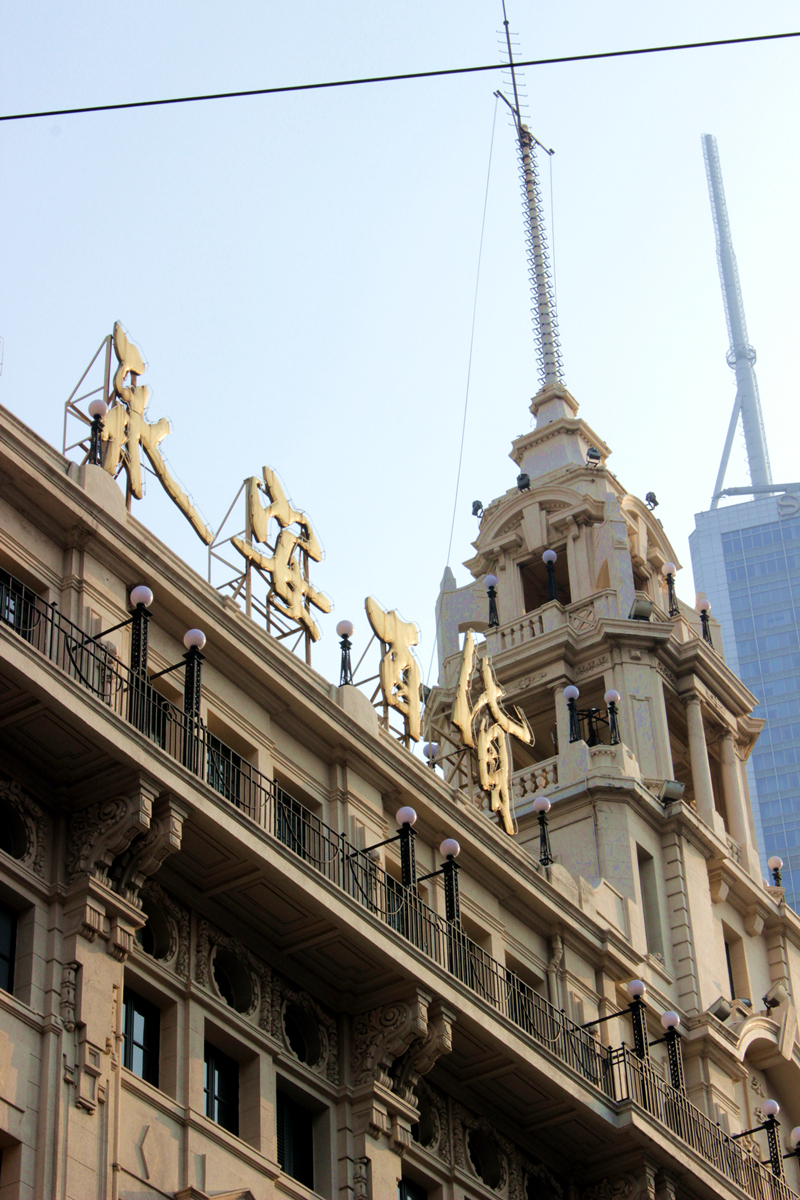 上海永安公司大楼